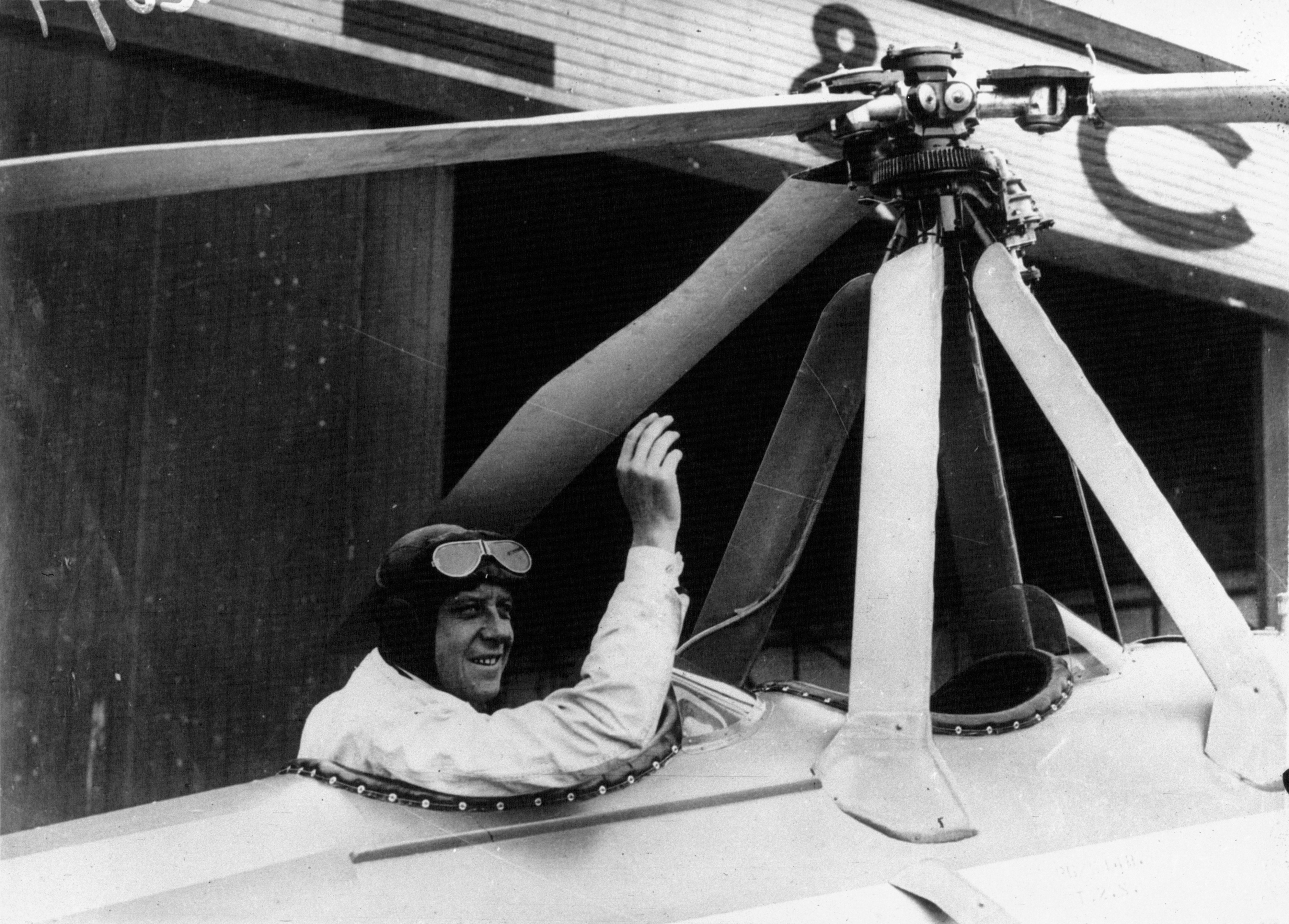 Roy Tuckett dans son nouvel autogyre.